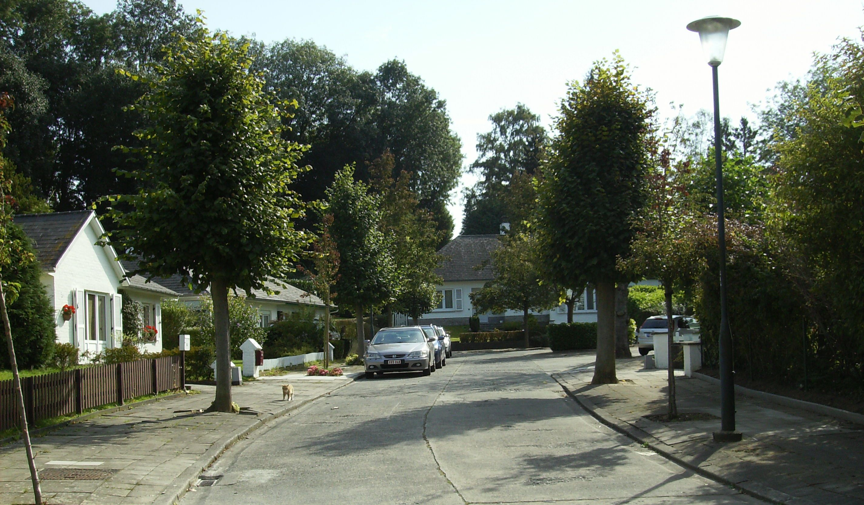 rue Firmin Martin Auderghem